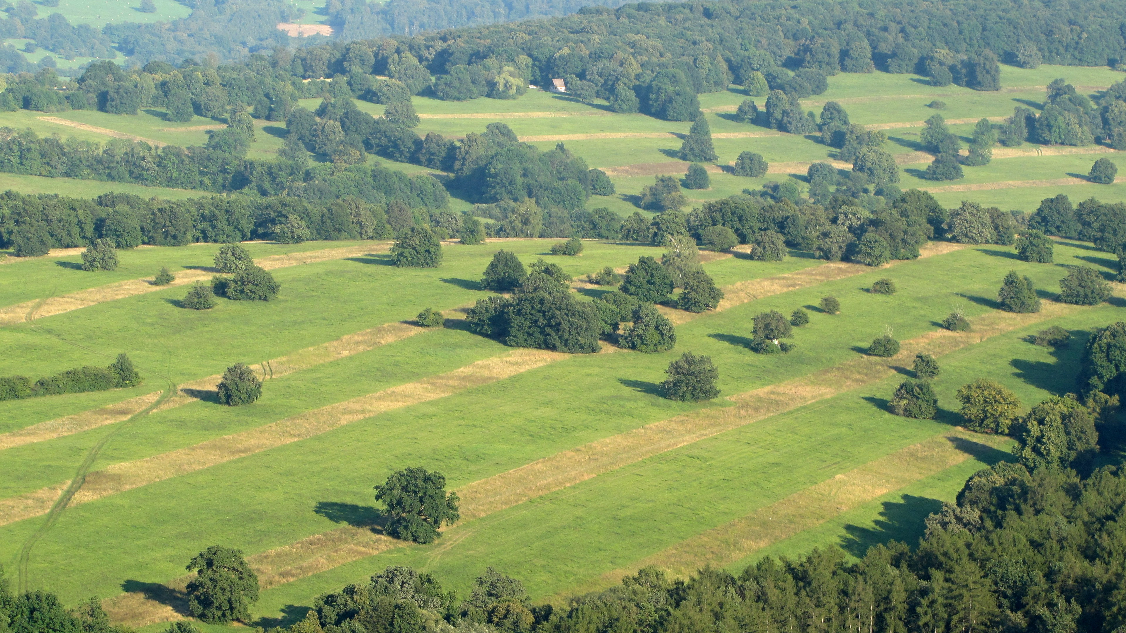 Pohled z rozhledny Travičná na Národní přírodní rezervaci Čertoryje v CHKO Bílé Karpaty